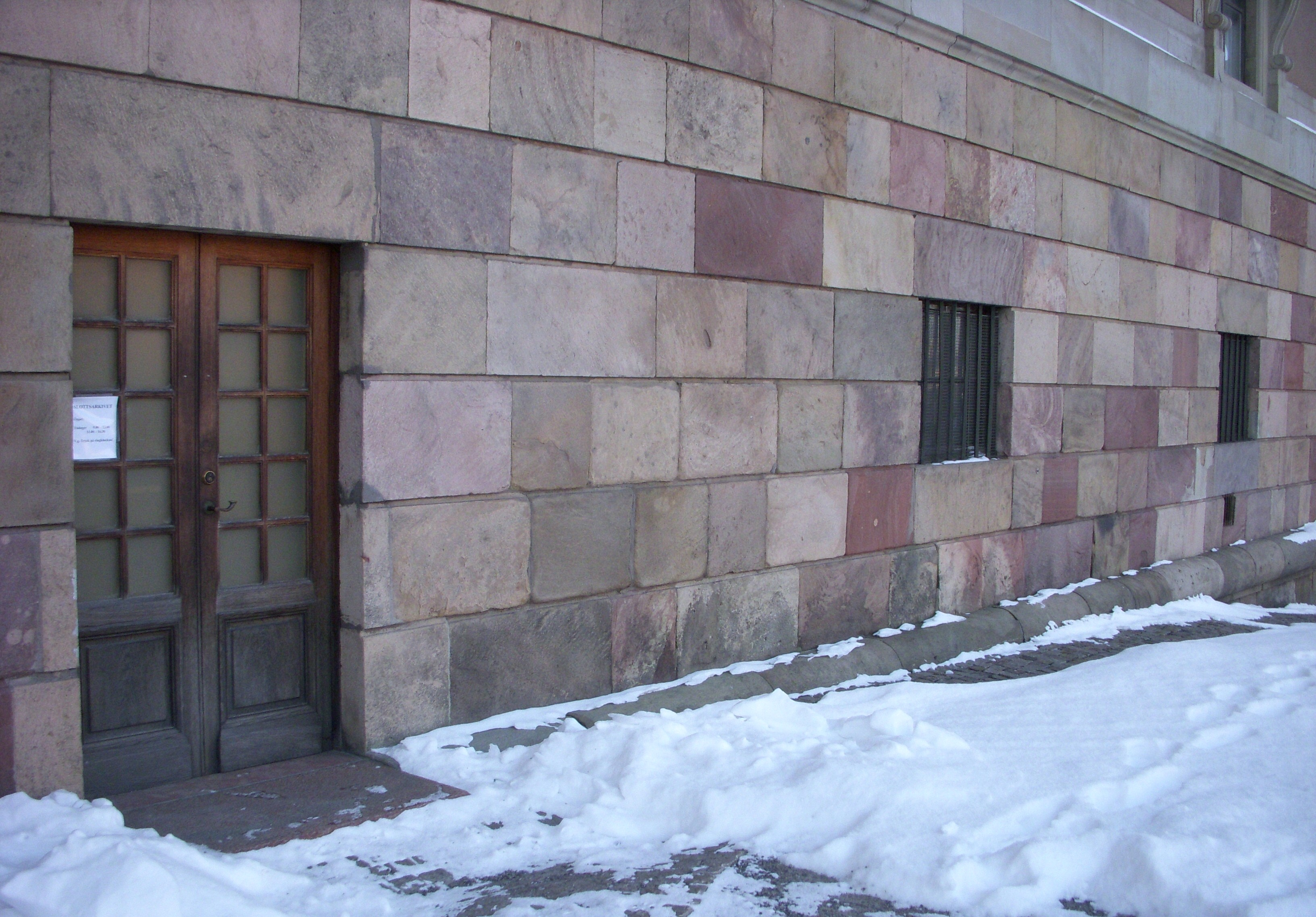 Stockholms slott: Ingång till slottsarkivet (norra fasaden)